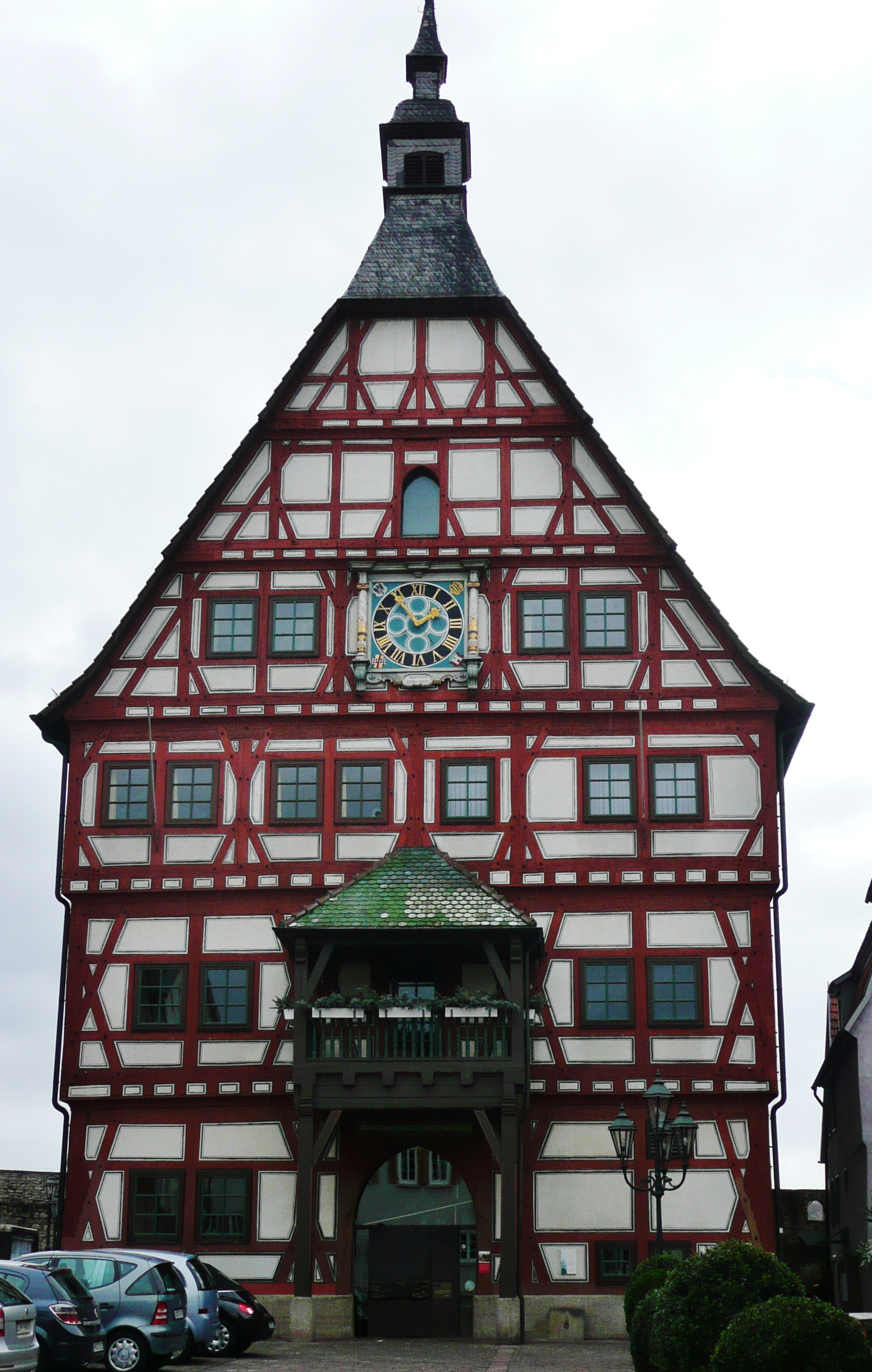 Besigheim, Fachwerk-Rathaus, erbaut 1459 als Kaufhaus